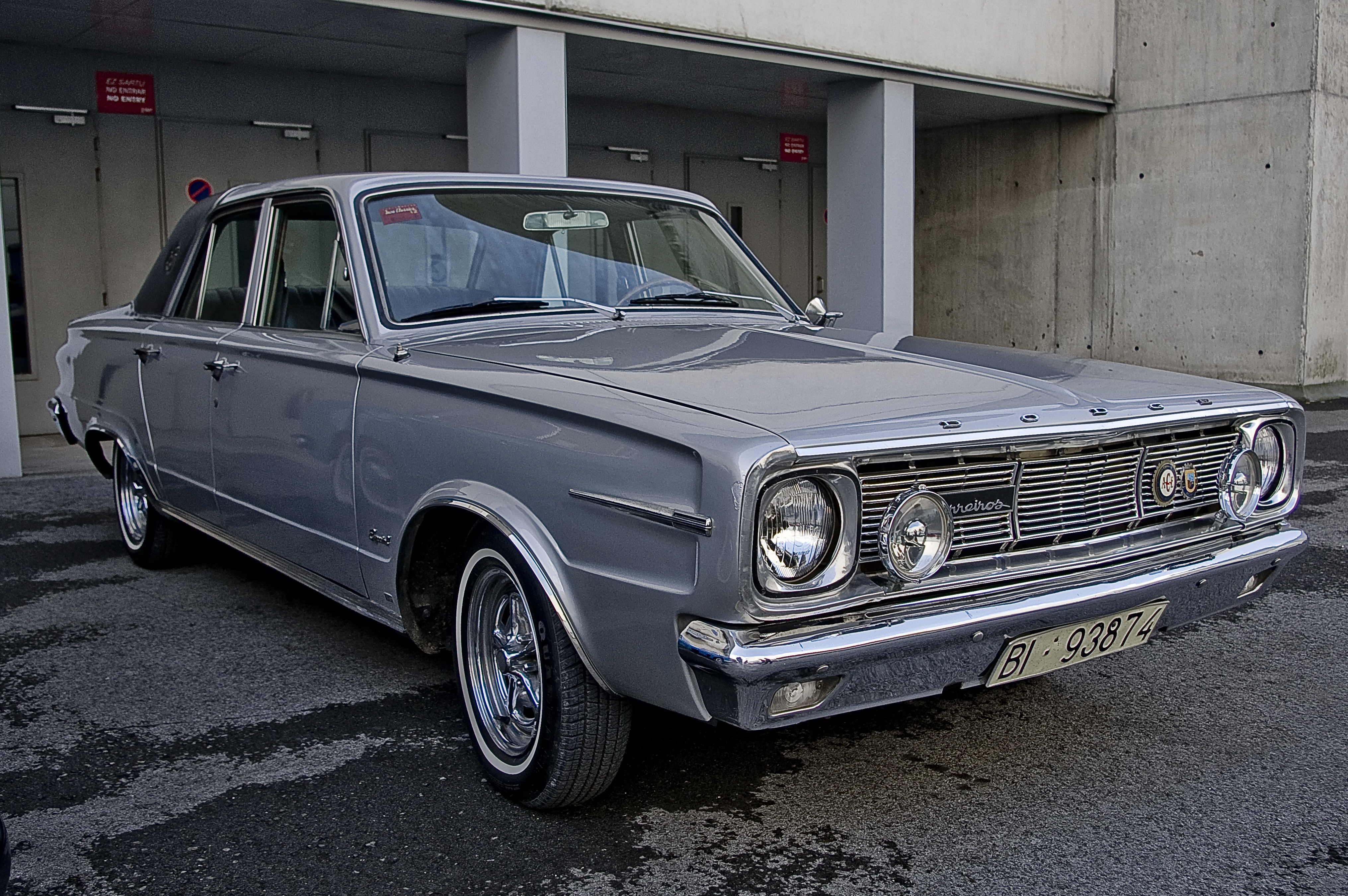 1966 Dodge Barreiros Dart GL